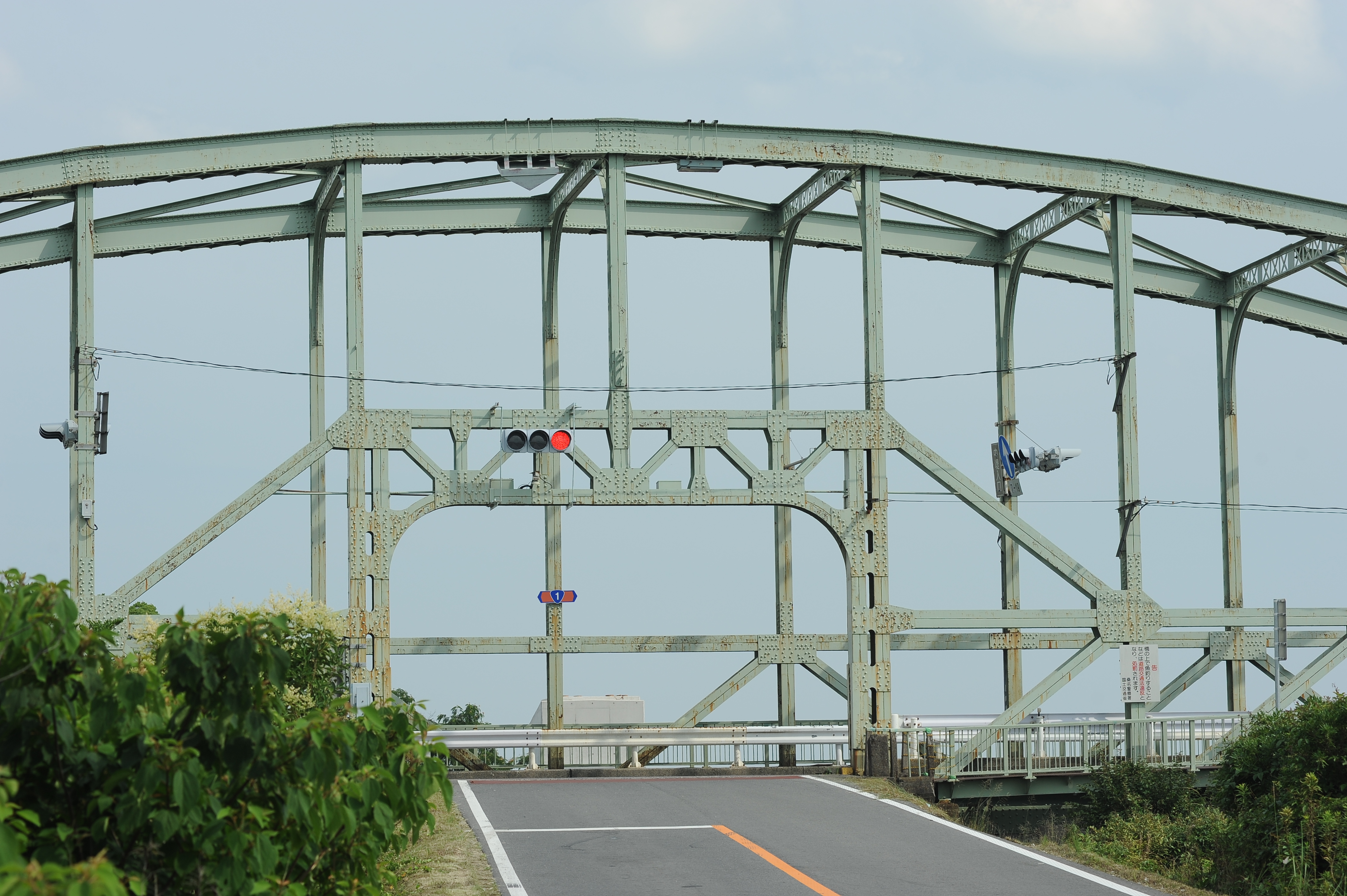 国道1号線伊勢大橋 中堤入口交差点 （三重県道106号桑名海津線起点）